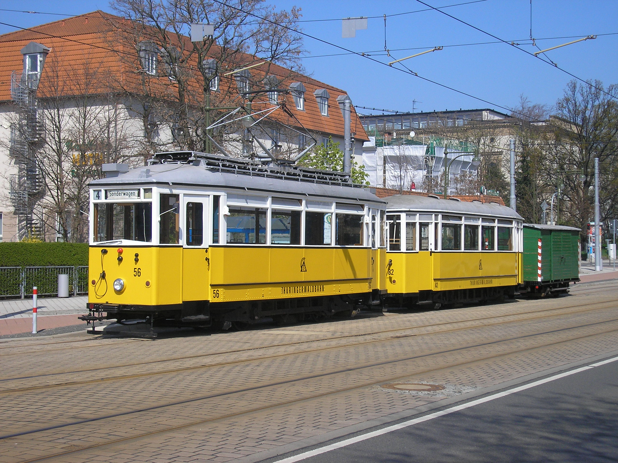 Ein historischer Zug der Thüringerwaldbahn in Gotha (Thüringen).